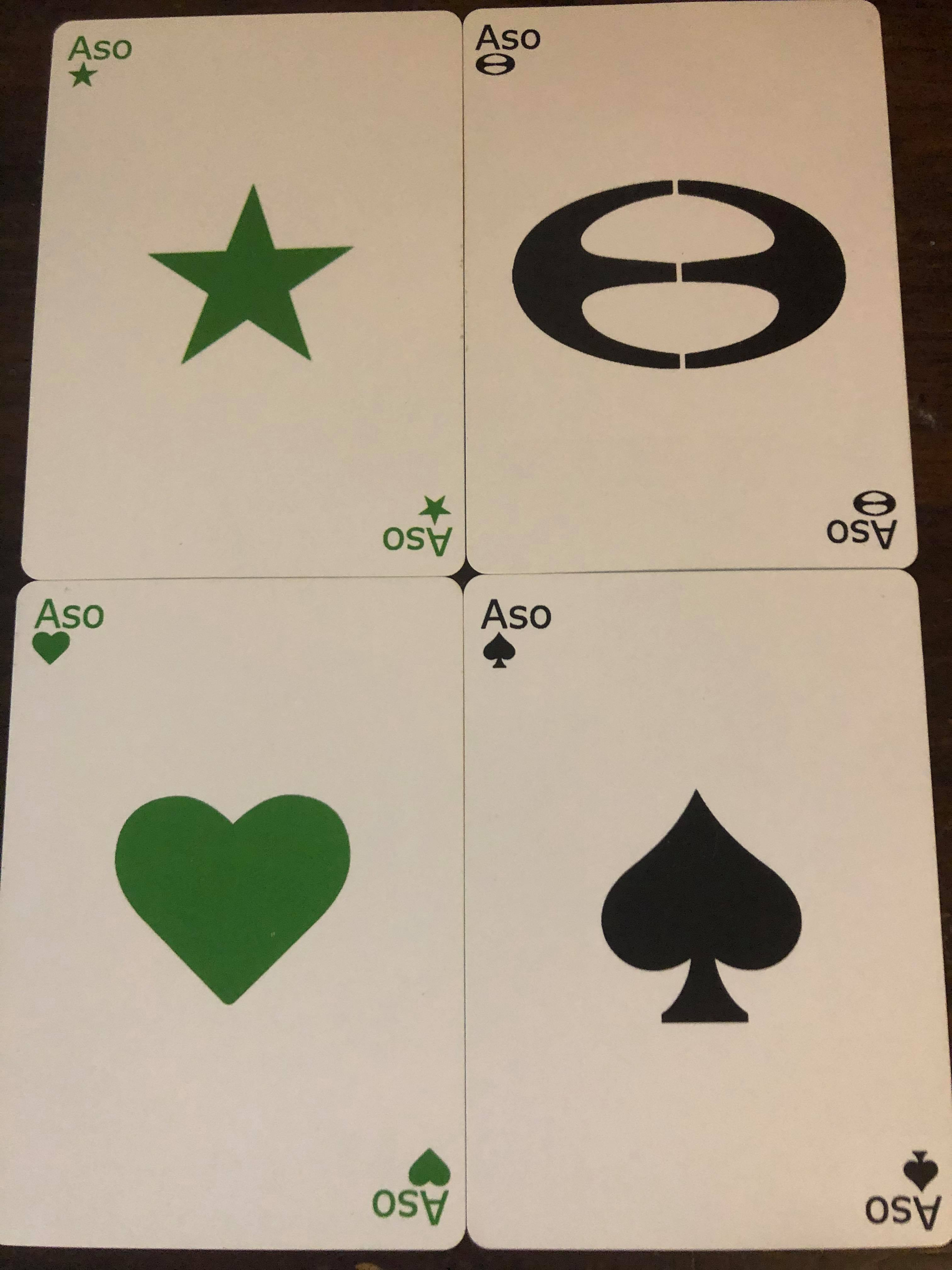 Esperantaj Stilaj Asoj